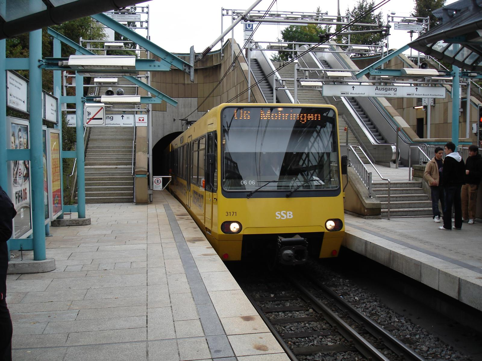 3171 an der Haltestelle Pragsattel